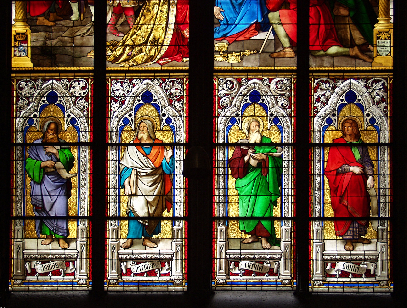 Kölner Dom - Bayernfenster. Ausschnitt aus dem rechten Hauptfenster „Die Menschwerdung Gottes in Jesu Christus“: Unterer Teil mit den vier Propheten Jesaja, Jeremias, Ezechiel und Daniel